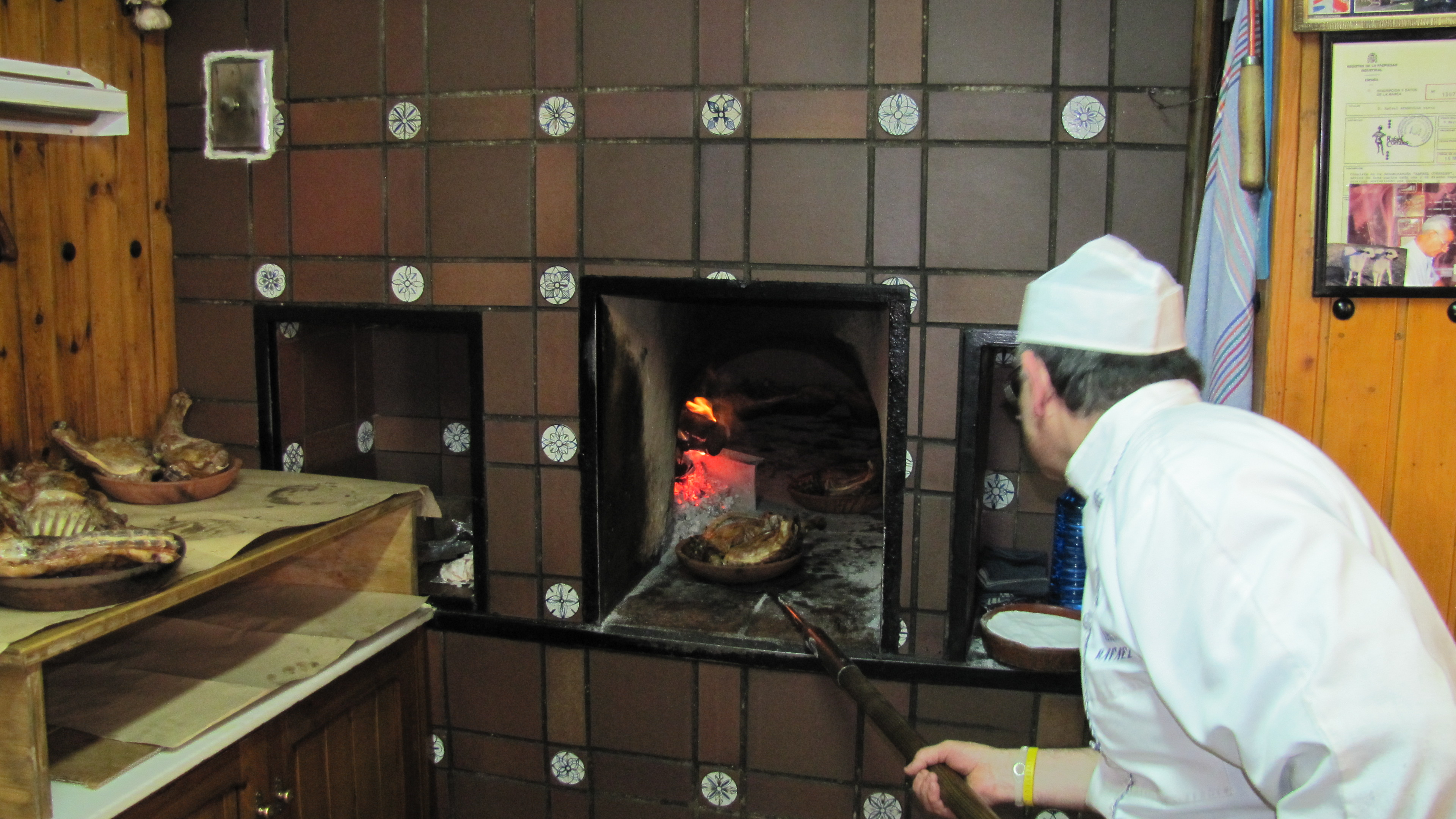 Horno de leña en el Asador Rafael Corrales de Aranda de Duero (Burgos), el más antiguo de la ciudad, fundado en 1902, donde se cocina el plato tradicional de la región: el lechazo asado.